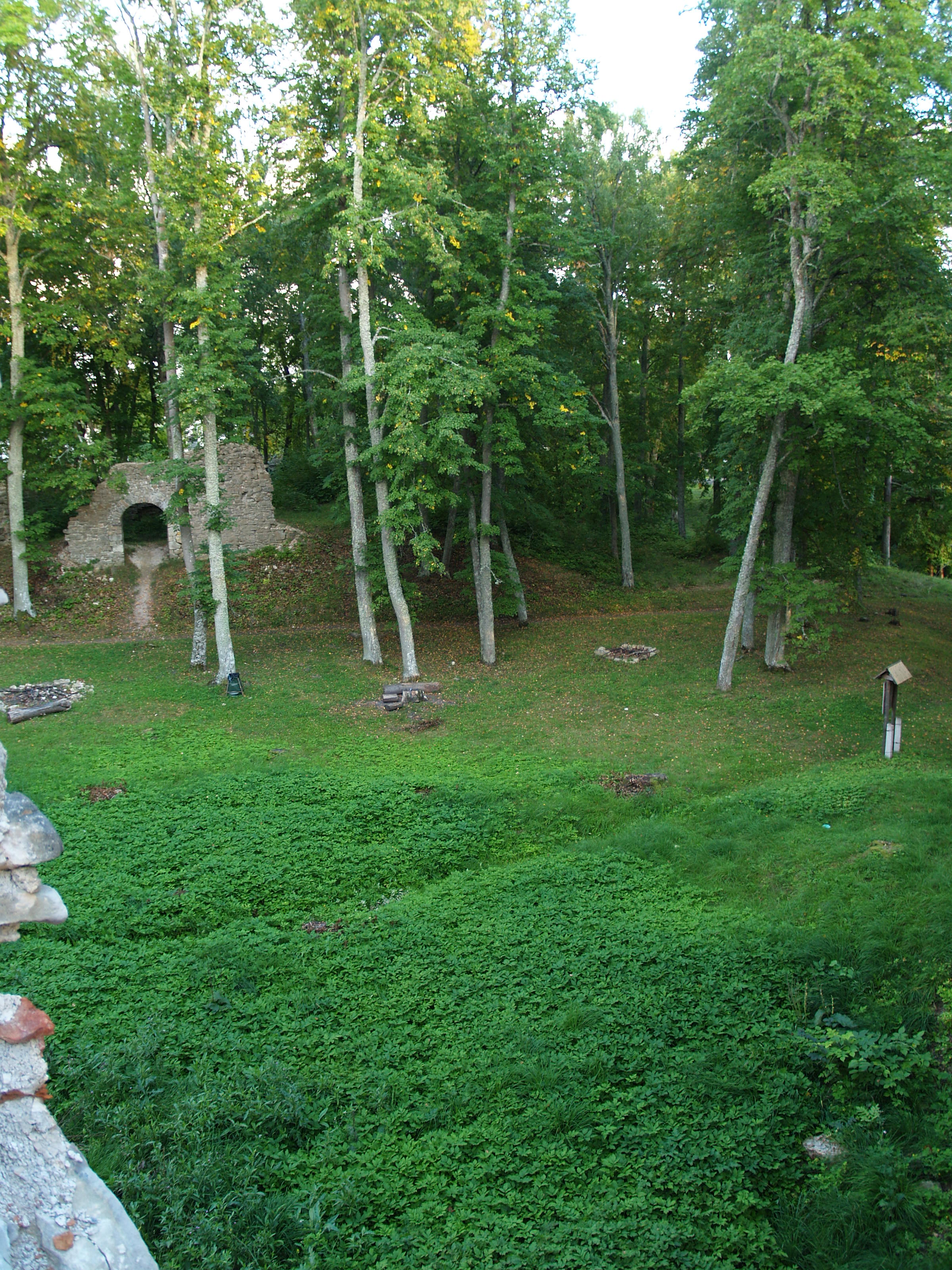 Gaujiena Castle ruins